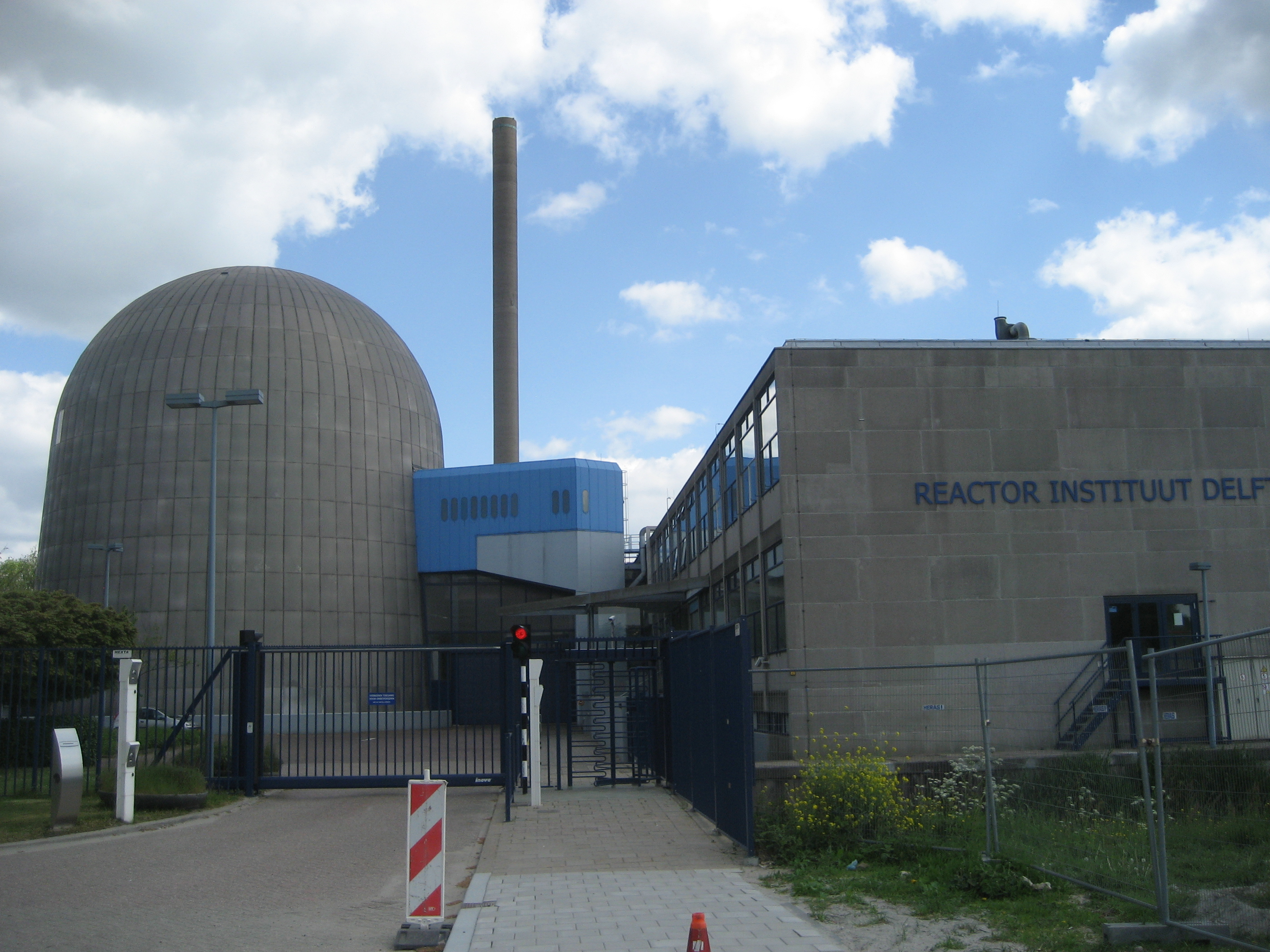 Reactor Instituut Delft (Nederland)